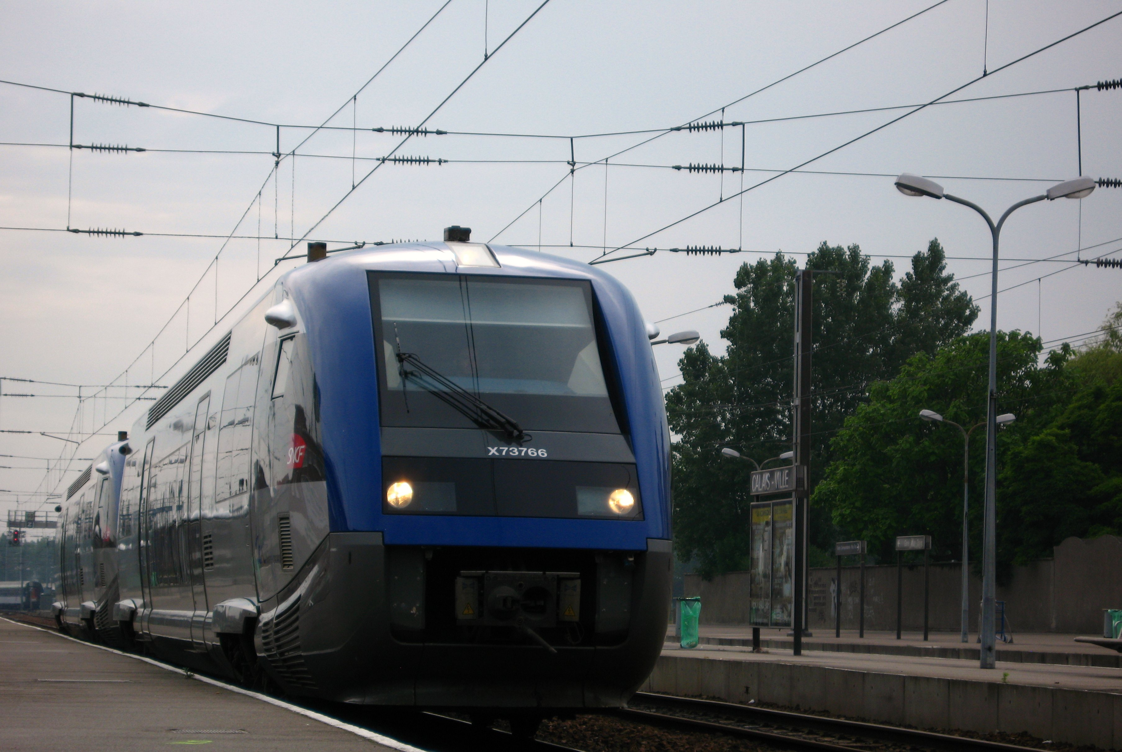 Calais-Ville, railbuses